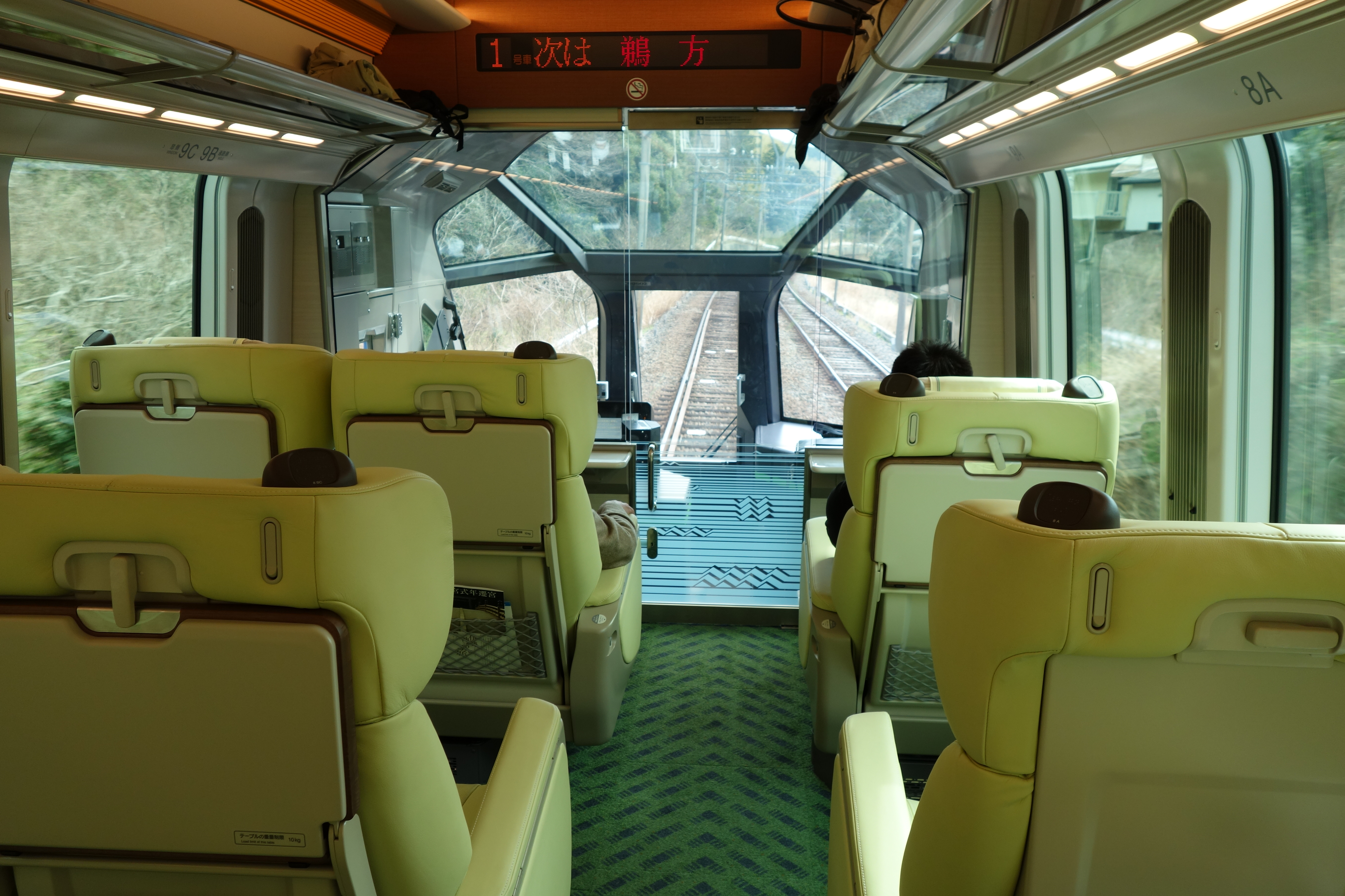 しまかぜ 前面展望